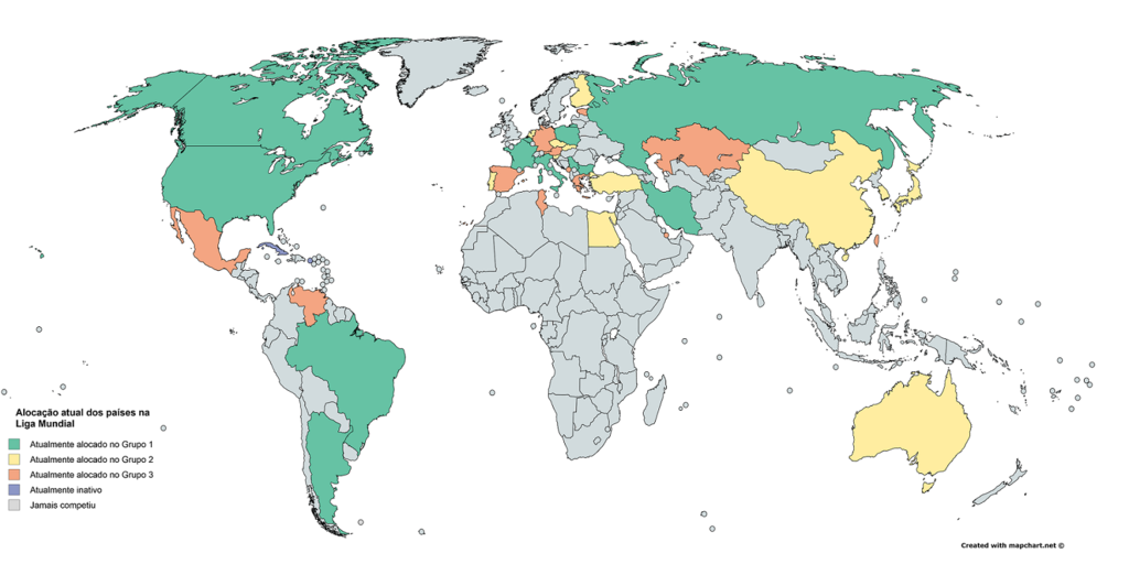 Mapa de alocação dos países participantes na Liga Mundial